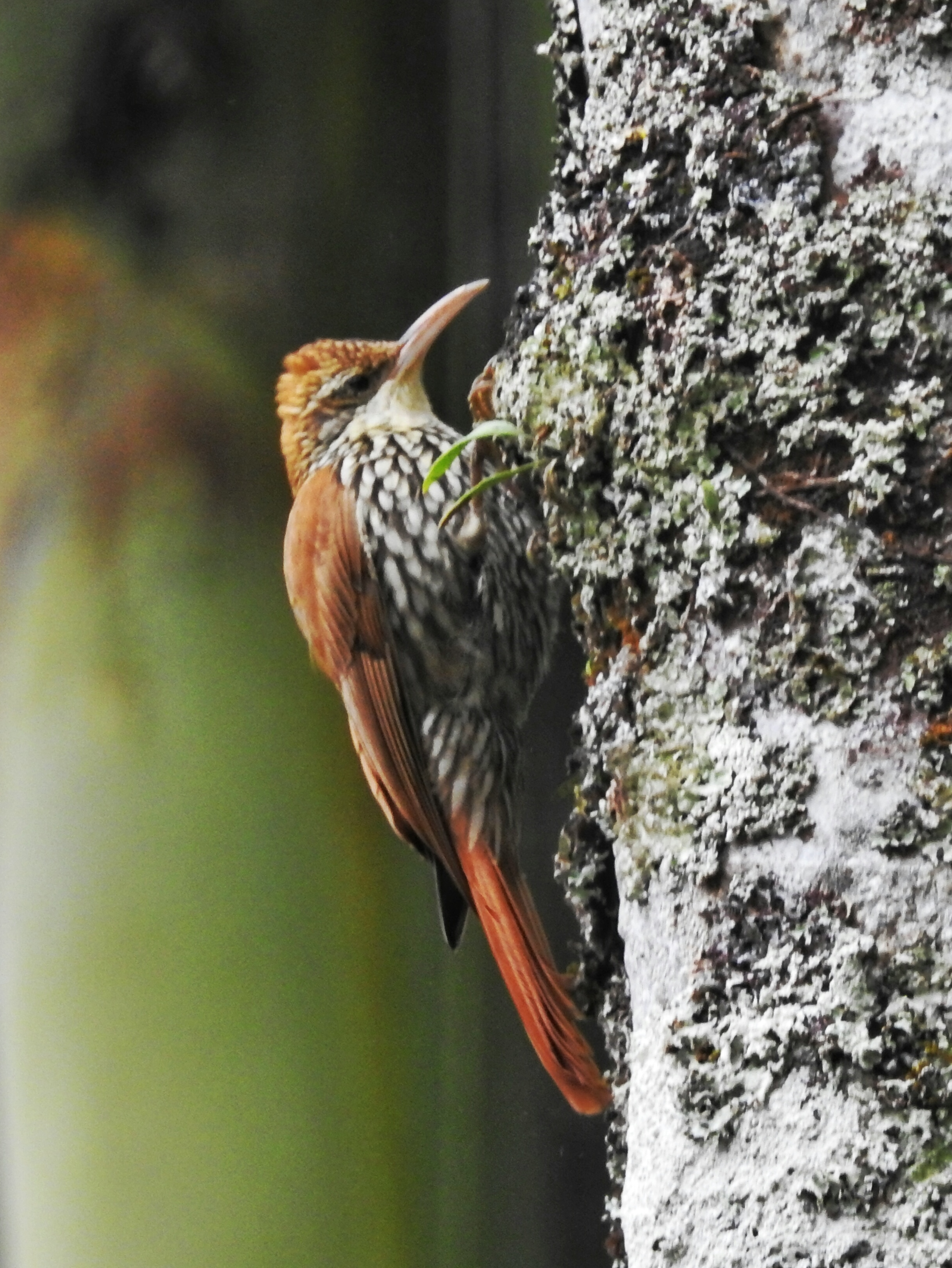 Arapaçu-escamado, ave fotografada no Recanto das Cigarras, Universidade Federal de Viçosa, Campus Viçosa, Minas Gerais.